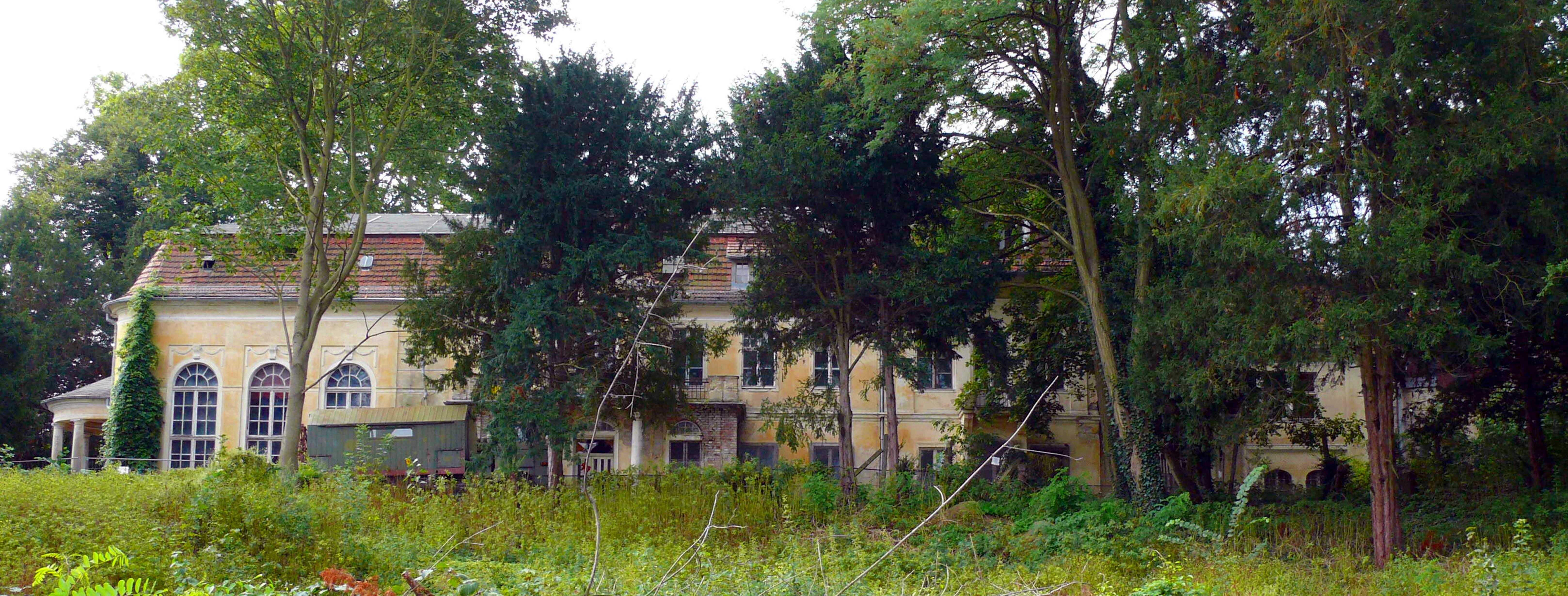 Villa Gutmann, Potsdam, Bertinistraße 16, 2007